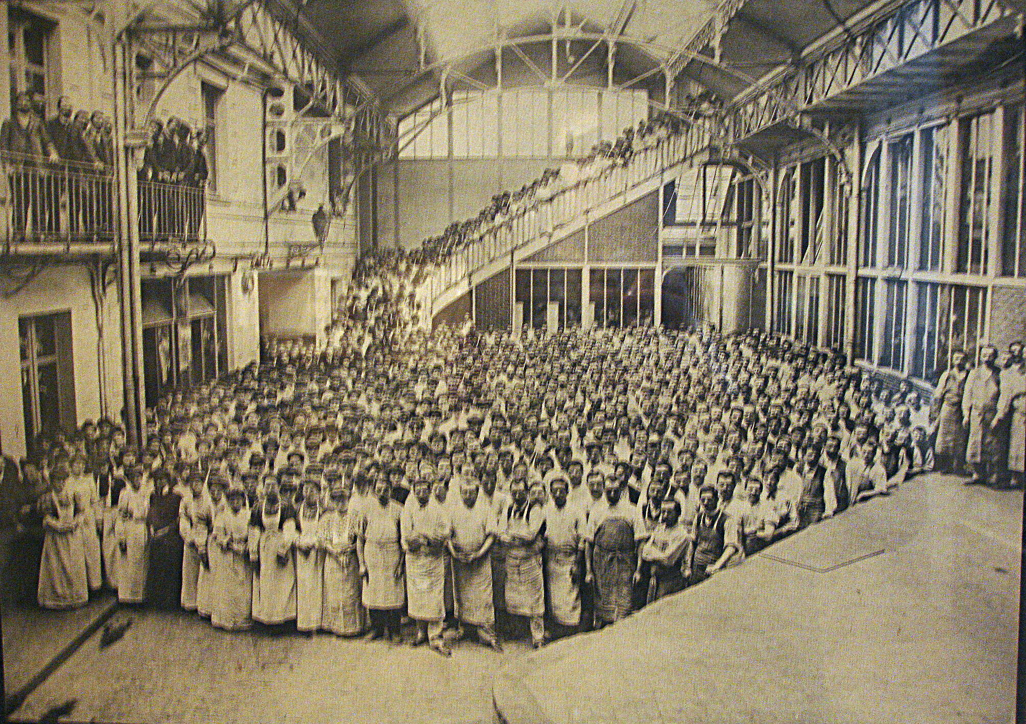 Employés de l'usine LU en 1907 - photo prise au Musée du château des ducs de Bretagne de Nantes